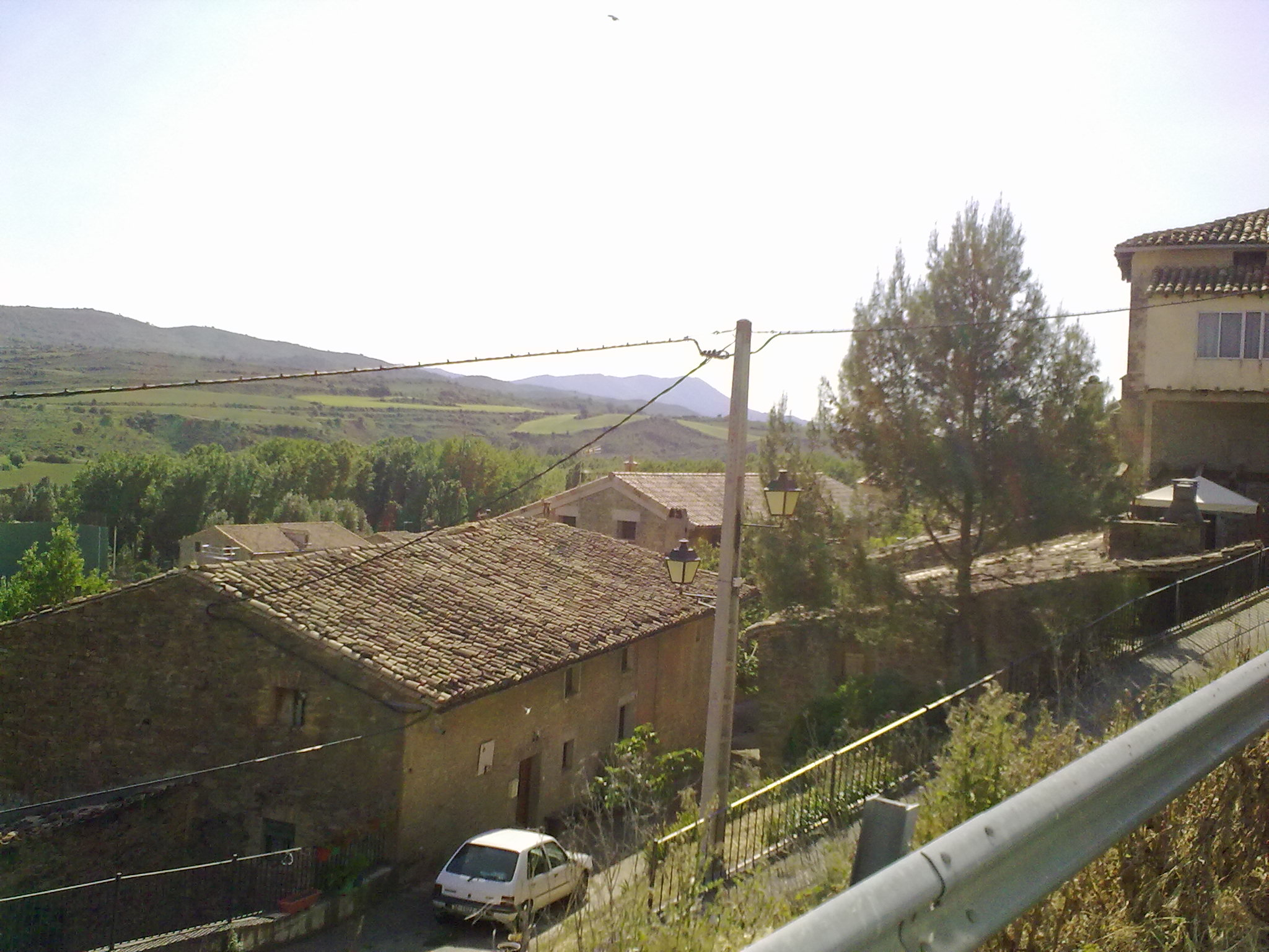 Navardún le 23 mai 2010. Espagne.